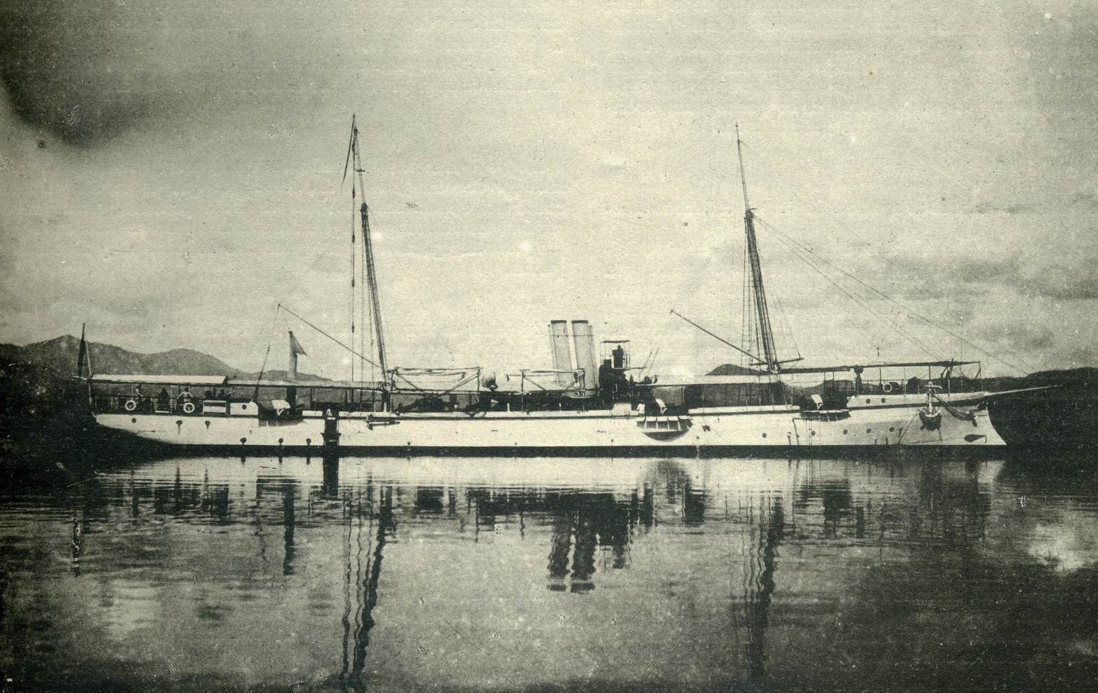 Cañonero torpedero Galicia (1891) de la clase Temerario, fue el último construido de esta série de 6 buques.